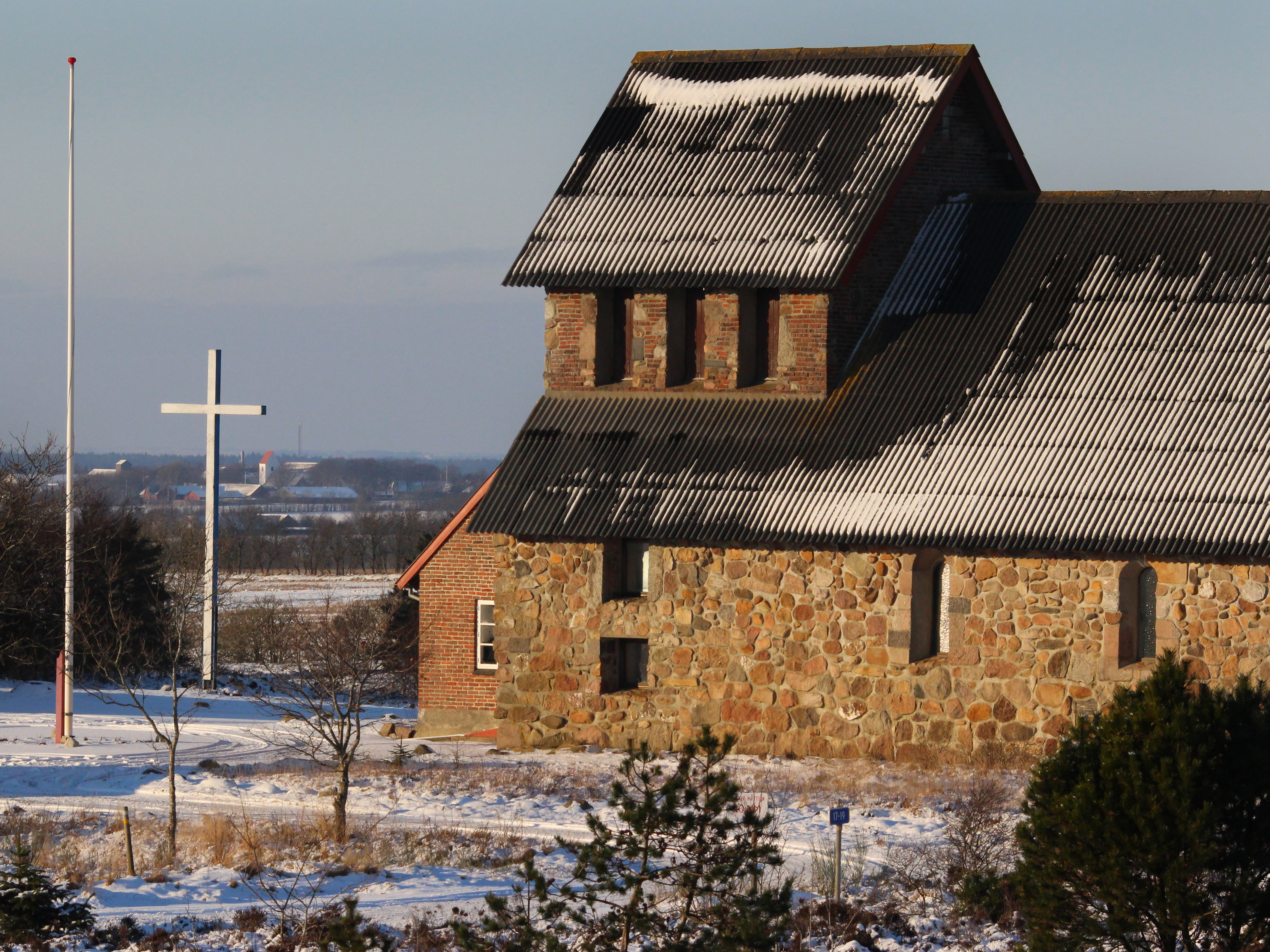 6940 Lem, Denmark